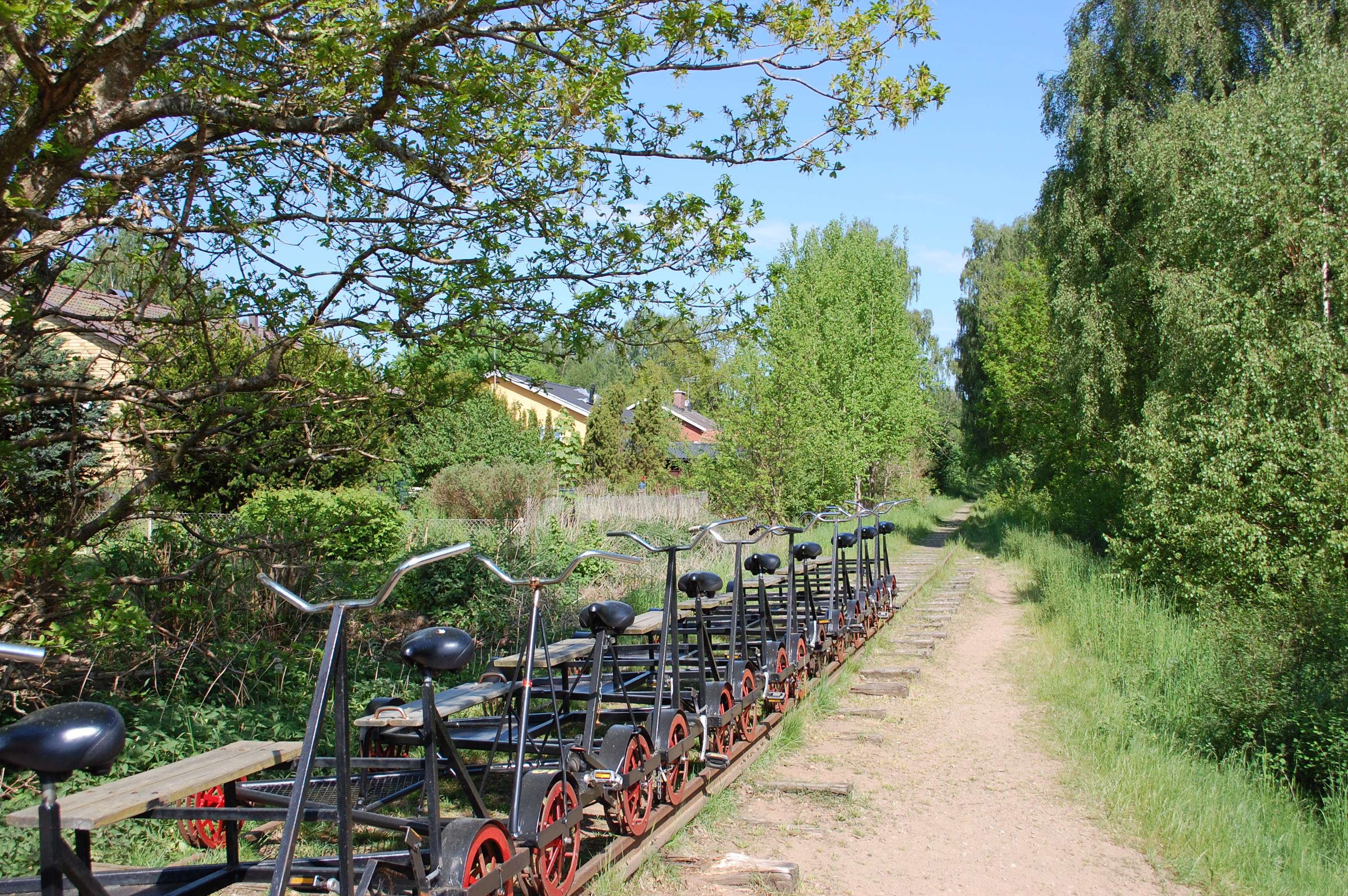 Draisinenstation in Richtung Glimminge